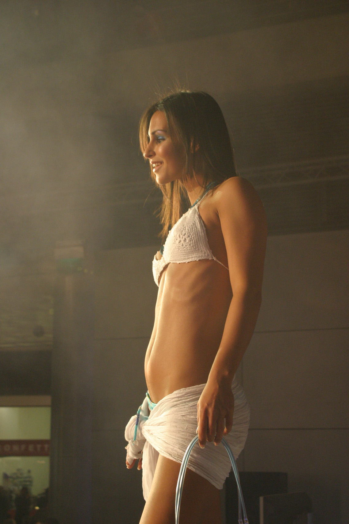 Lúcia Garcia, Portuguese model